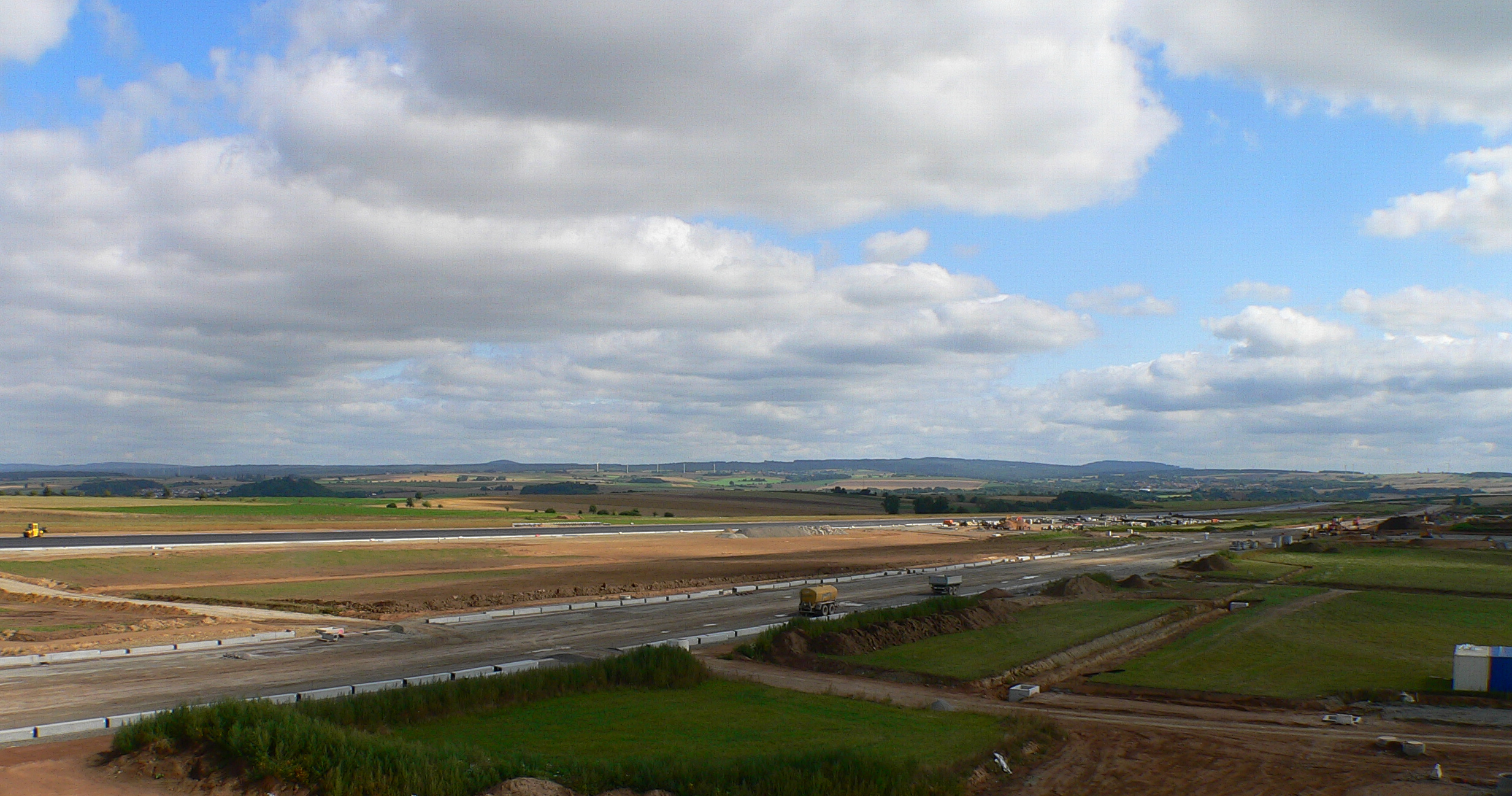 Flugplatz Kassel-Calden. Start- und Landebahn (Runway), und Rollbahn (Taxiway) des neuen Regionalflughafens in Bau. Blickrichtung Nordost.